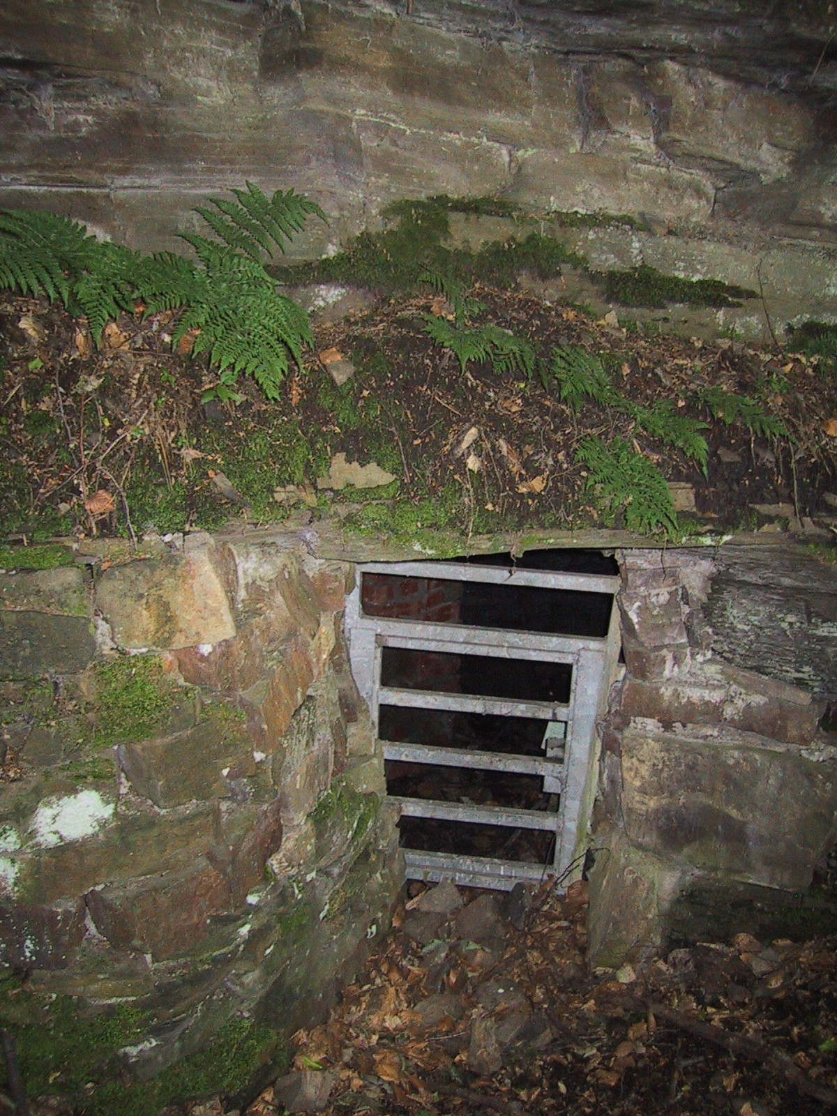 Vergitterter Eingang eines nur etwa 25 m² großen Schutzbunkers aus dem 20. Jahrhundert am Fuß des Kaisbergs in Hagen-Vorhalle, er befindet sich in einem Altsteinbruch an der Zufahrtsstraße zum Klärwerk Hagen und wurde oft falsch als „Mundloch des Kaisbergstollens“ interpretiert